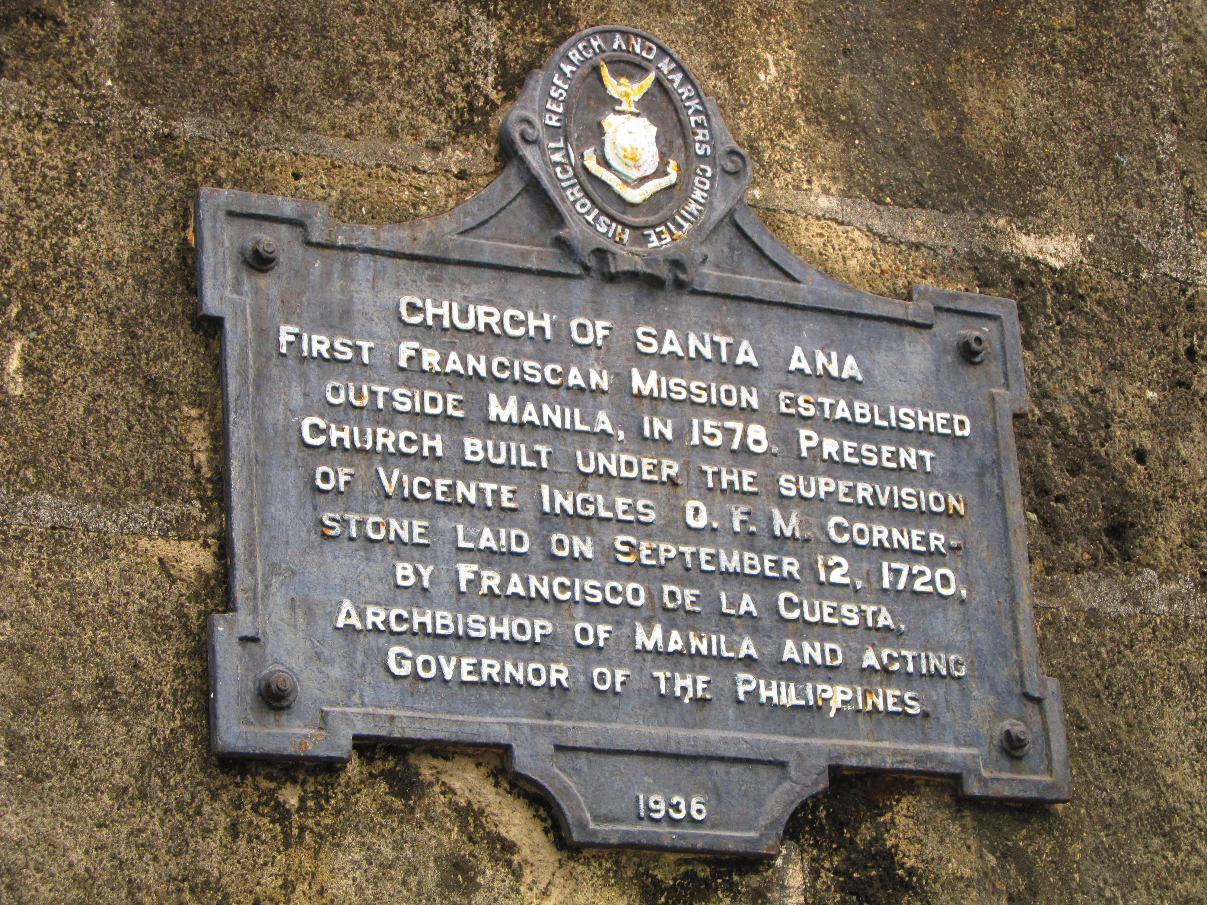 Santa Ana Church in Manila, Philippines